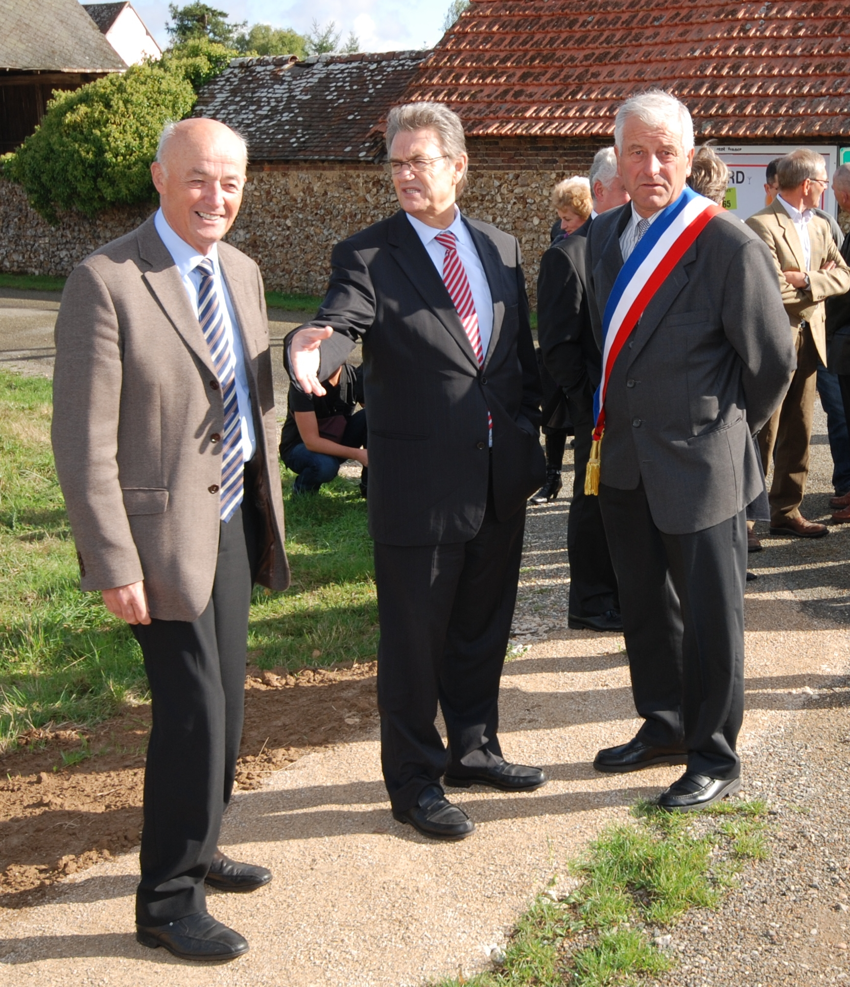 Gérard Huet à droite,ceint de son écharpe de Maire. Elle se porte sur l'épaule droite. Photo inversée ?